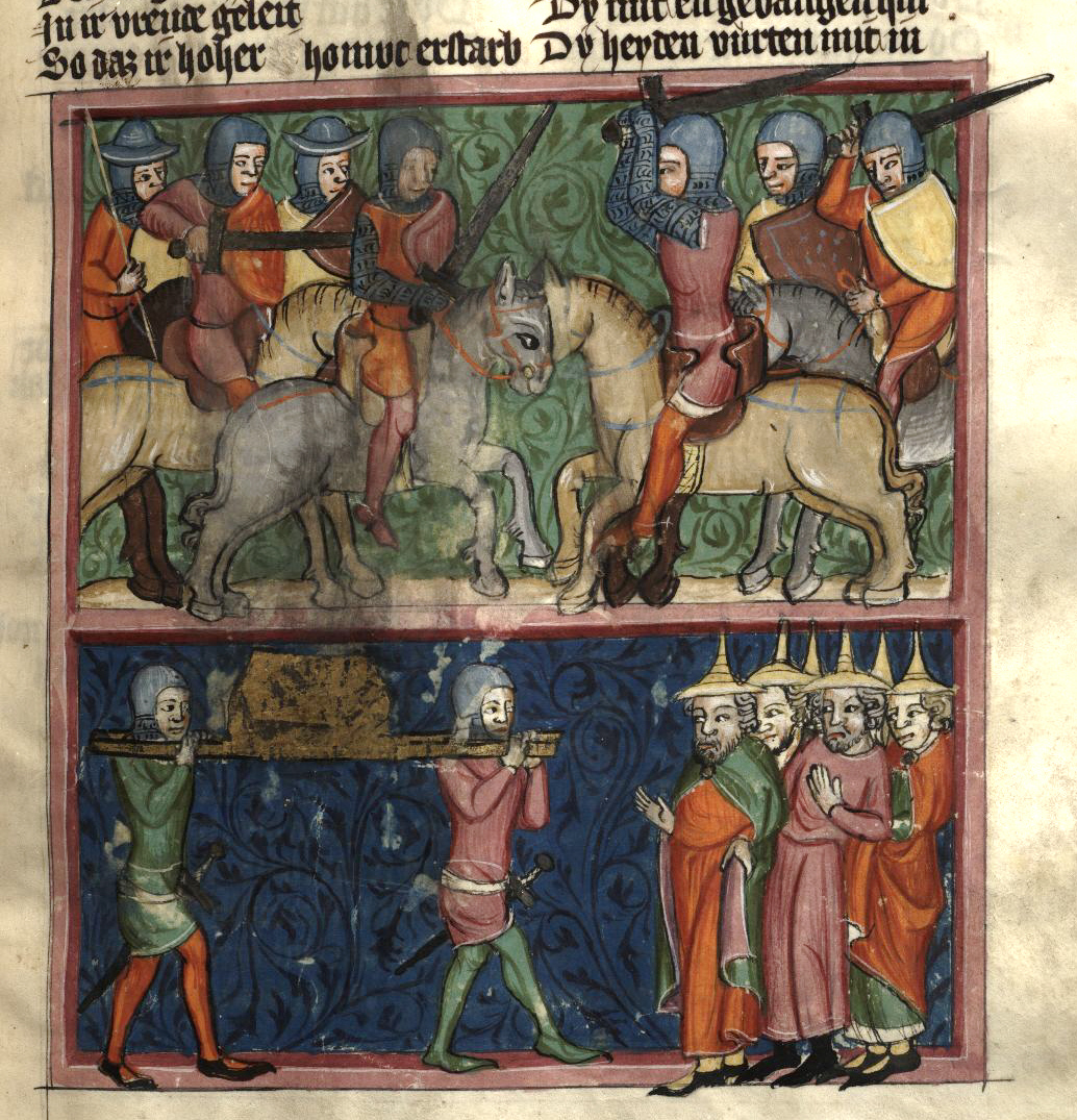 Rudolf von Ems: Weltchronik. Böhmen (Prag), 3. Viertel 14. Jahrhundert. Hochschul- und Landesbibliothek Fulda, Aa 88. Bildbeschreibung nach Martin Roland. fol. 209r , Miniatur 129 Schlacht gegen die Philister / Miniatur 130 Die Bundeslade wird geraubt